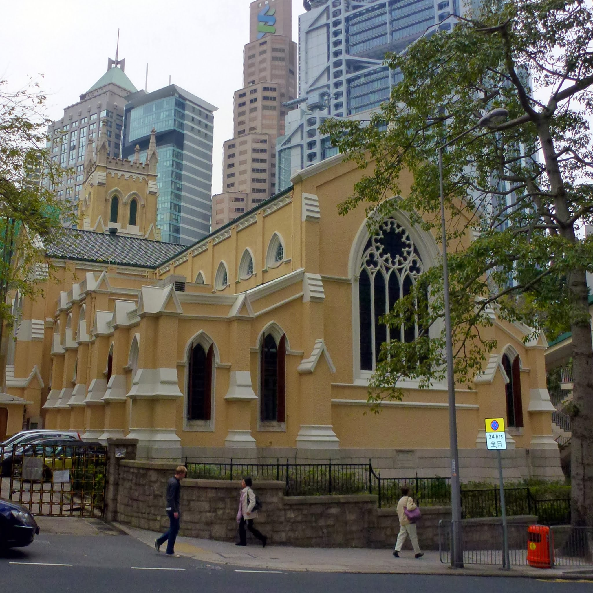 Hong Kong